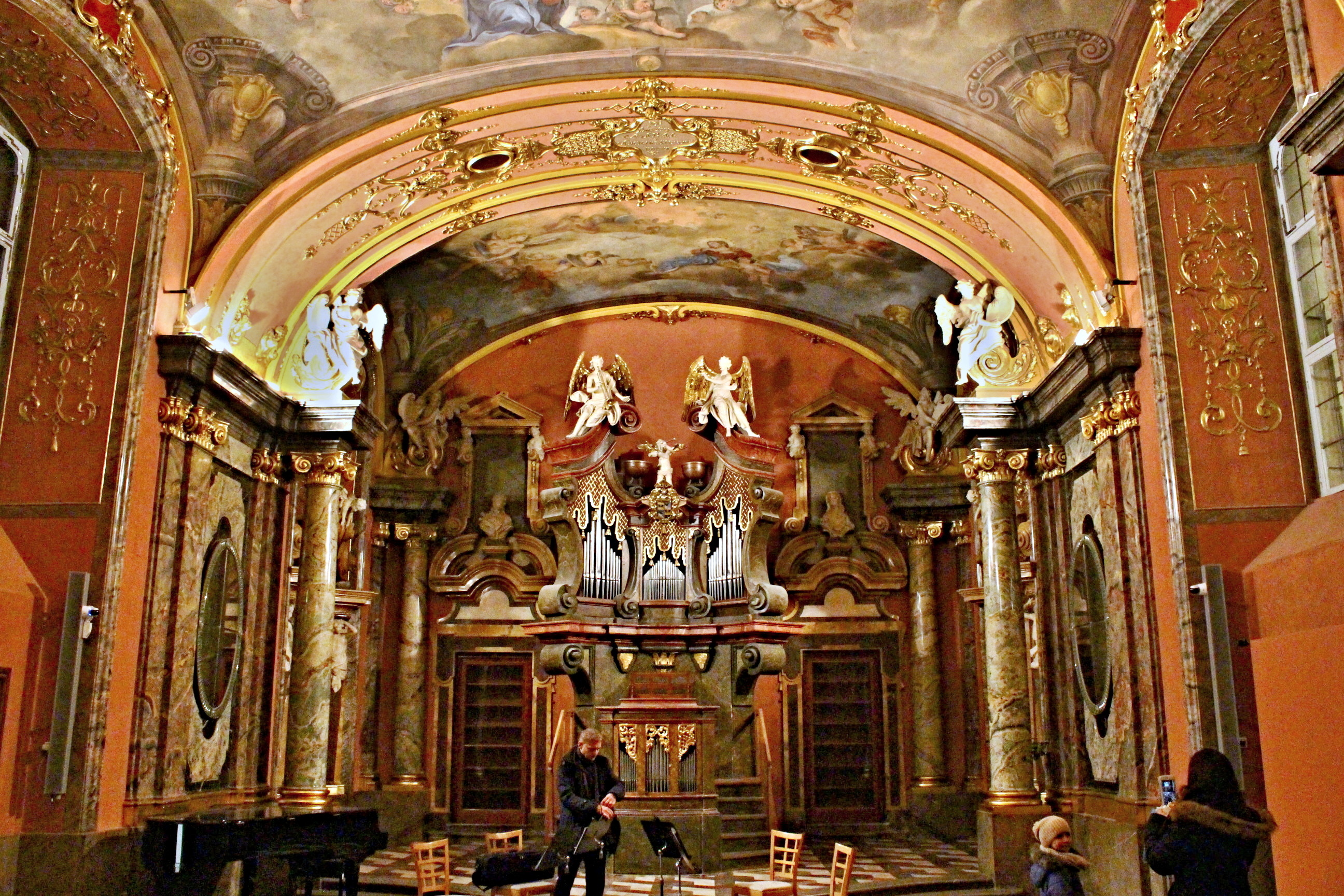 Klementinum, Zrcadlová kaple